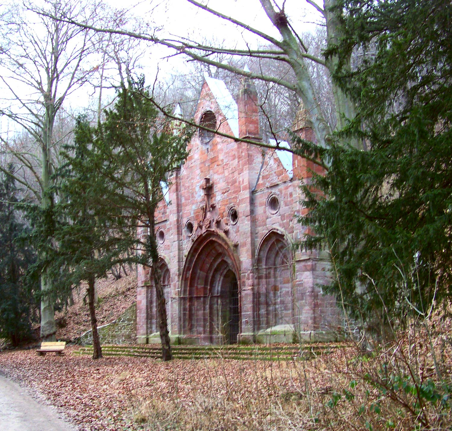 Erbbegräbnis der Grafen von Assenburg-Falkenstein bei Meisdorf (Harz)